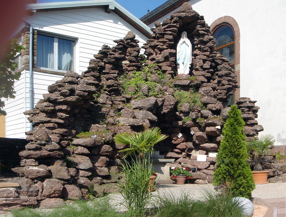 Réplique de la grotte de Lourdes située à Dannelbourg, Moselle